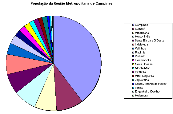 Gráfico que mostra a população dos municípios da Região Metropolitana de Campinas.